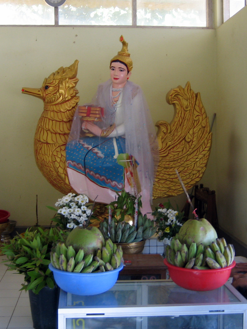 Thurathadi (Saraswati) at the Insein Kyaukdawgyi Temple, Yangon